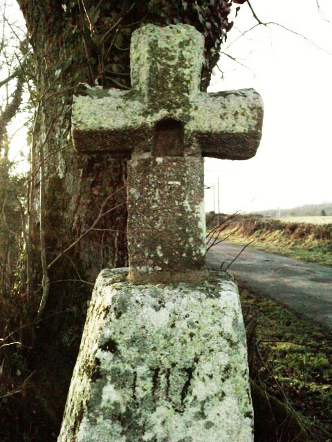 A l'intersection de la route descendant au Hameau de "la Vergnolle" et celle allant vers le mont "Peum"